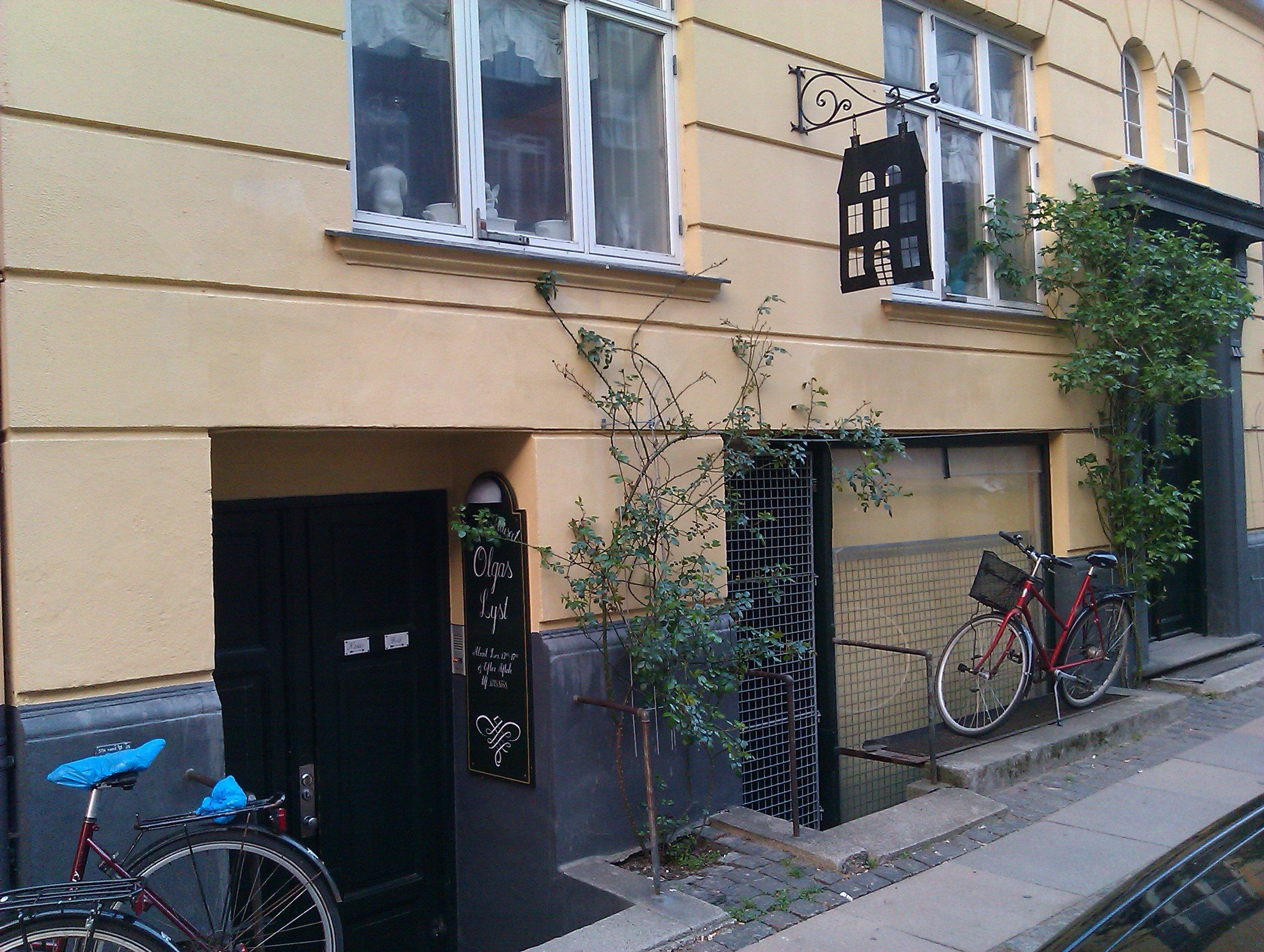 Dukkemuseum Olgas Lyst, København